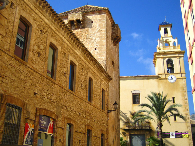 Torre del Palau i l'església de Sant Roc a El Verger, Marina Alta, País Valencià.